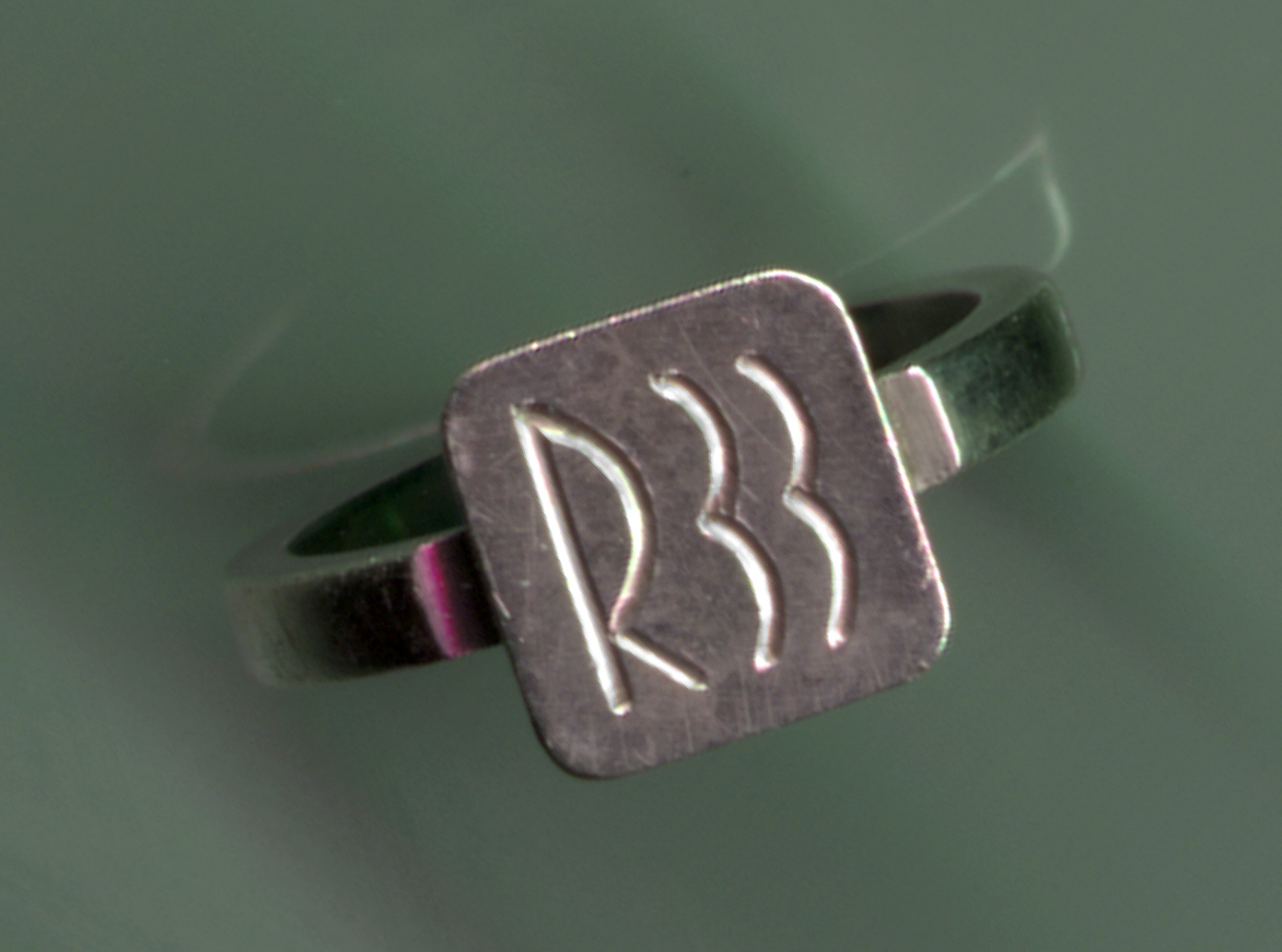 Ring van de Rotterdamse kring van beeldende kunstenaars R33